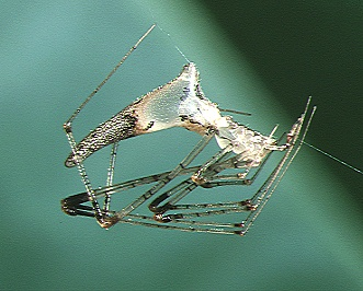 female Rhomphaea tanikawai from Okinawa.